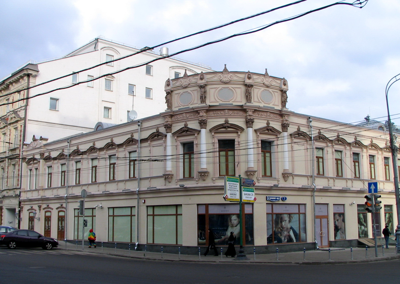 Petrovka Street, 6. Moscow Москва, Петровка, 6 (Кузнецкий мост, 7)